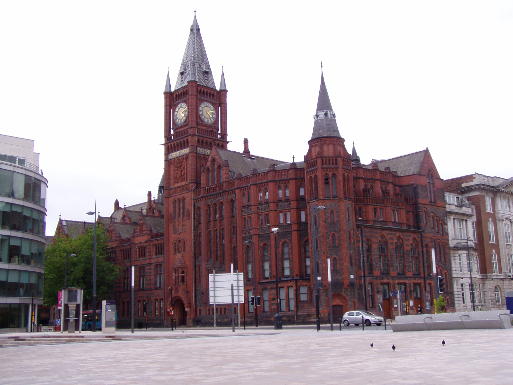 Victoria Building